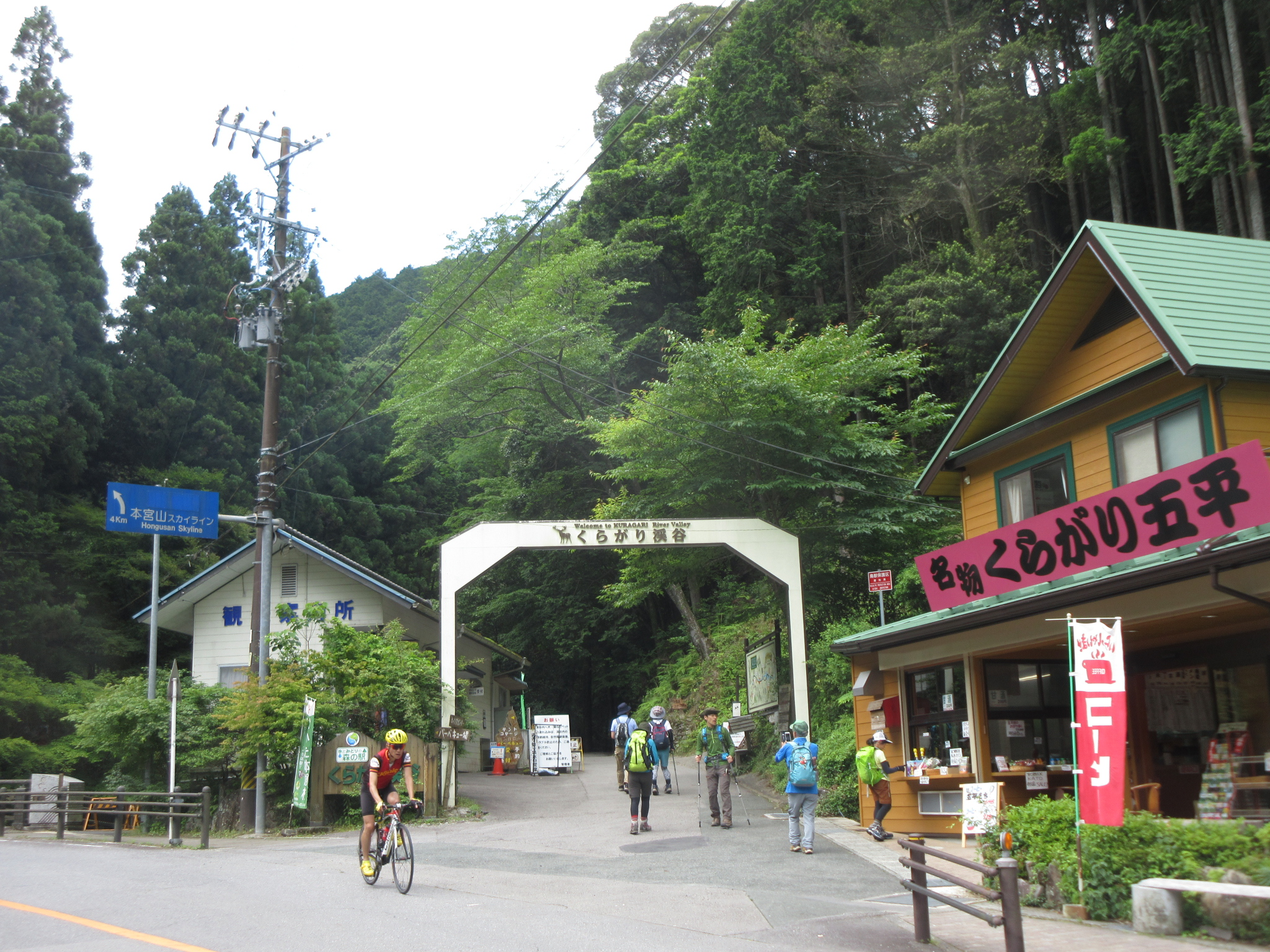 くらがり渓谷（岡崎市石原町）